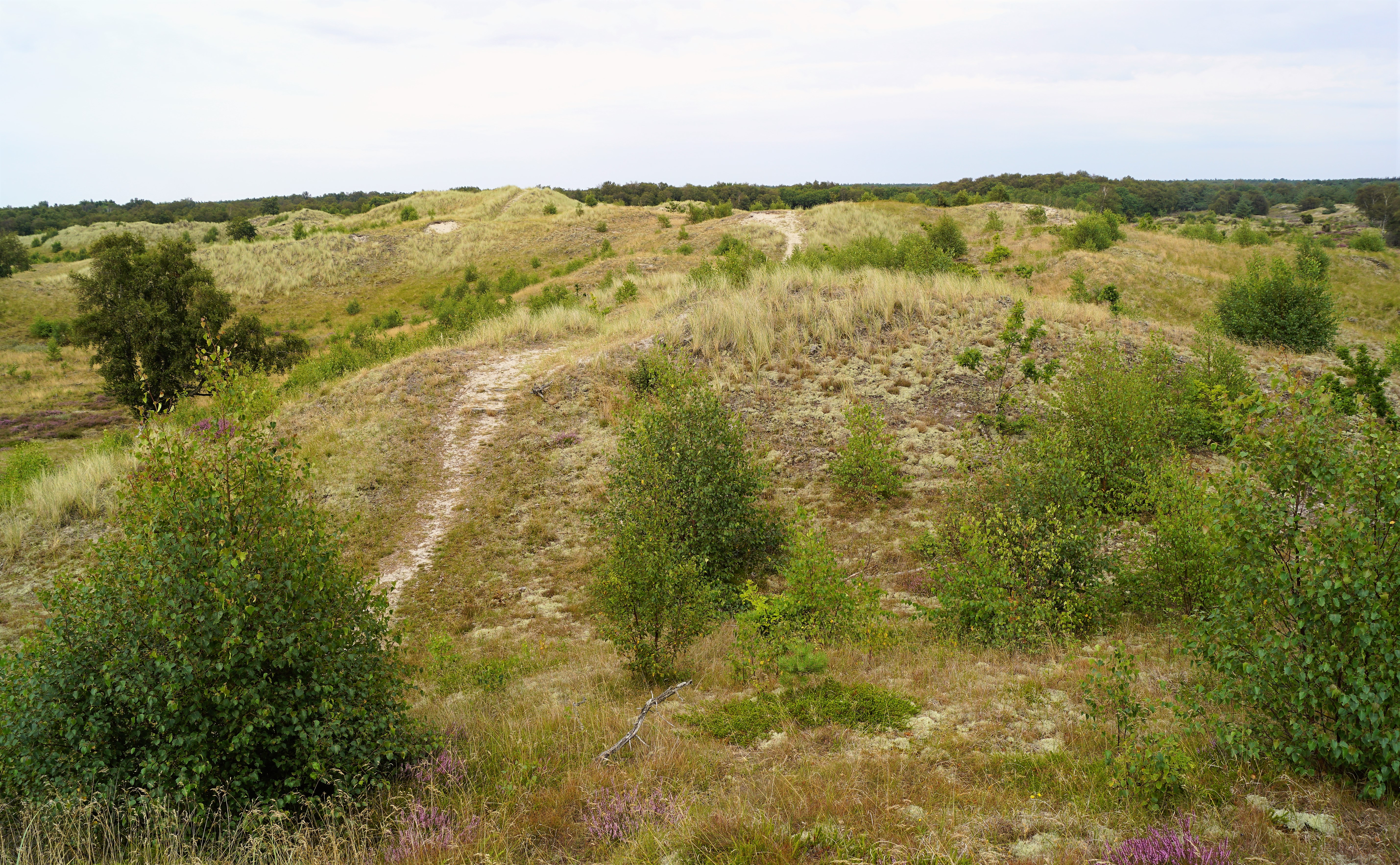 Højsande set mod øst